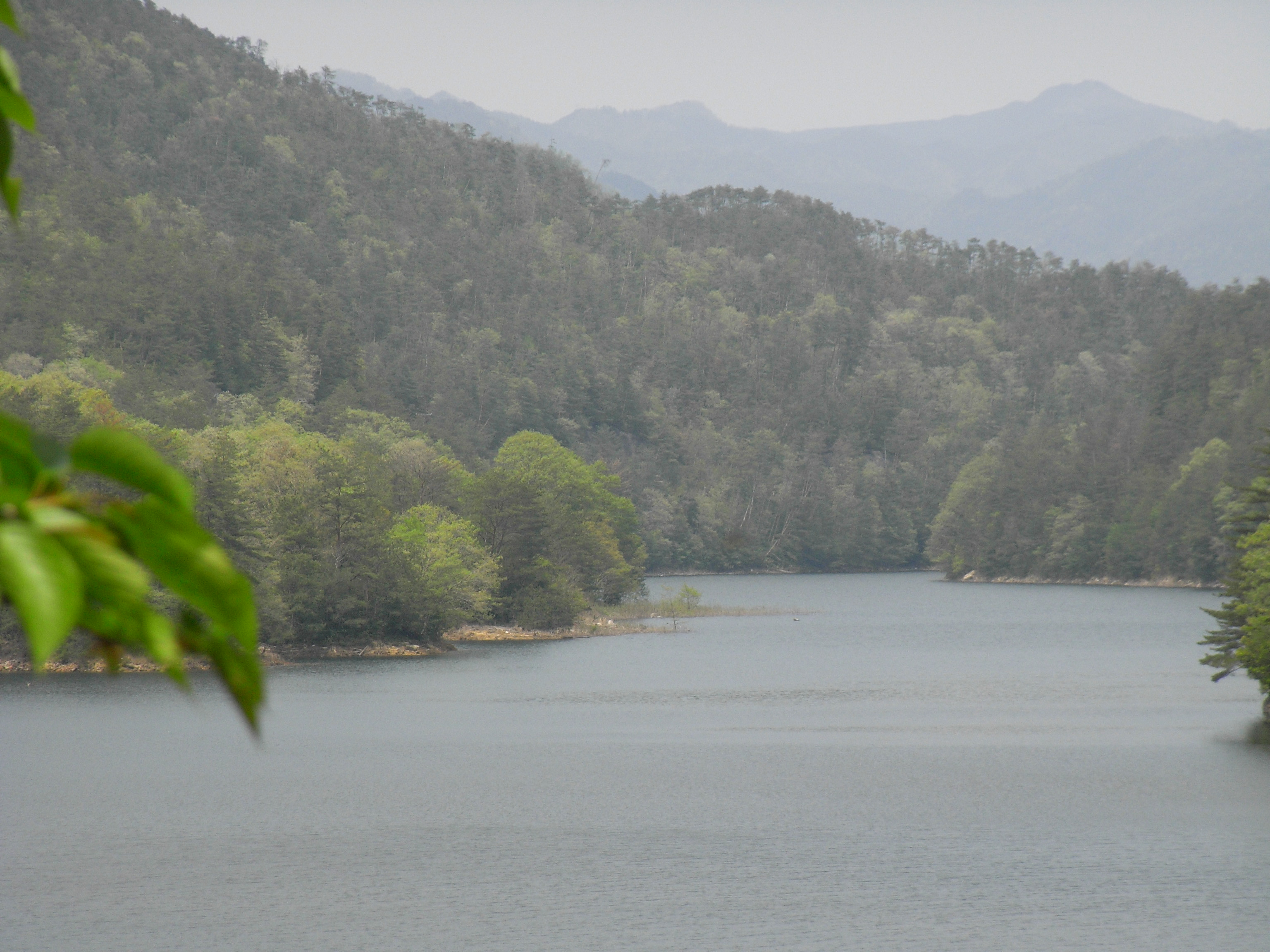 Lake